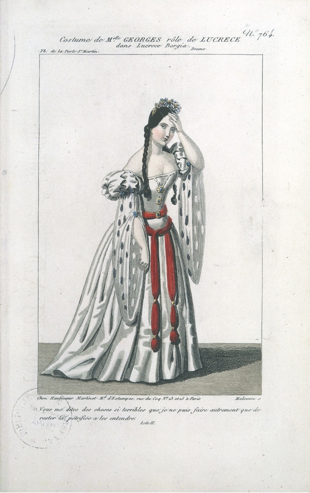 Titre : [Lucrèce Borgia : lot d'estampes] Éditeur : Hautecoeur Martinet (Paris) Date d'édition : 1833 Format : Rec. factice ; 23 x 14,5 cm Identifiant : ark:/12148/btv1b64000012